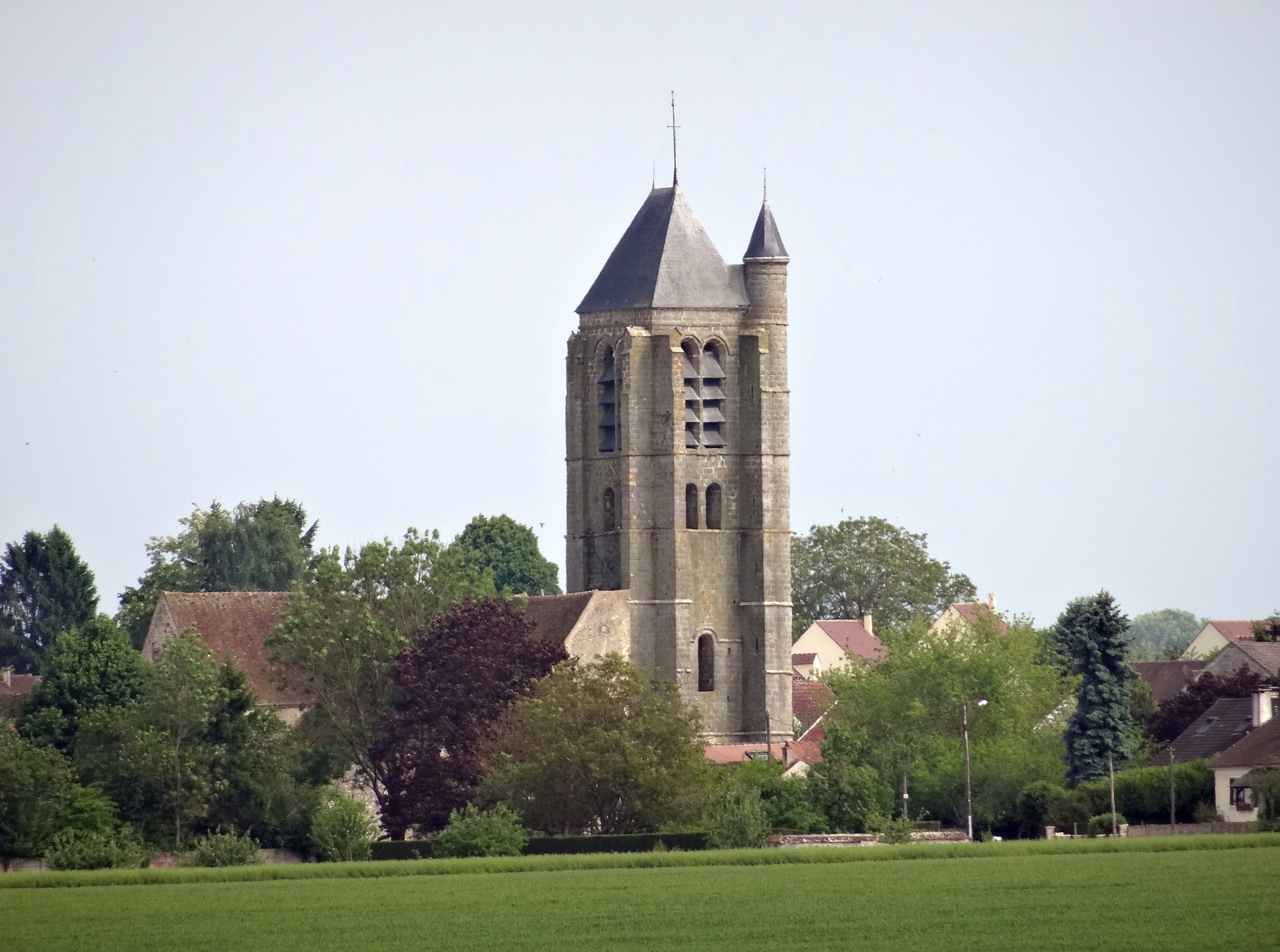 Église Saint-Martin de Sourdun. (Seine-et-Marne, région Île-de-France).